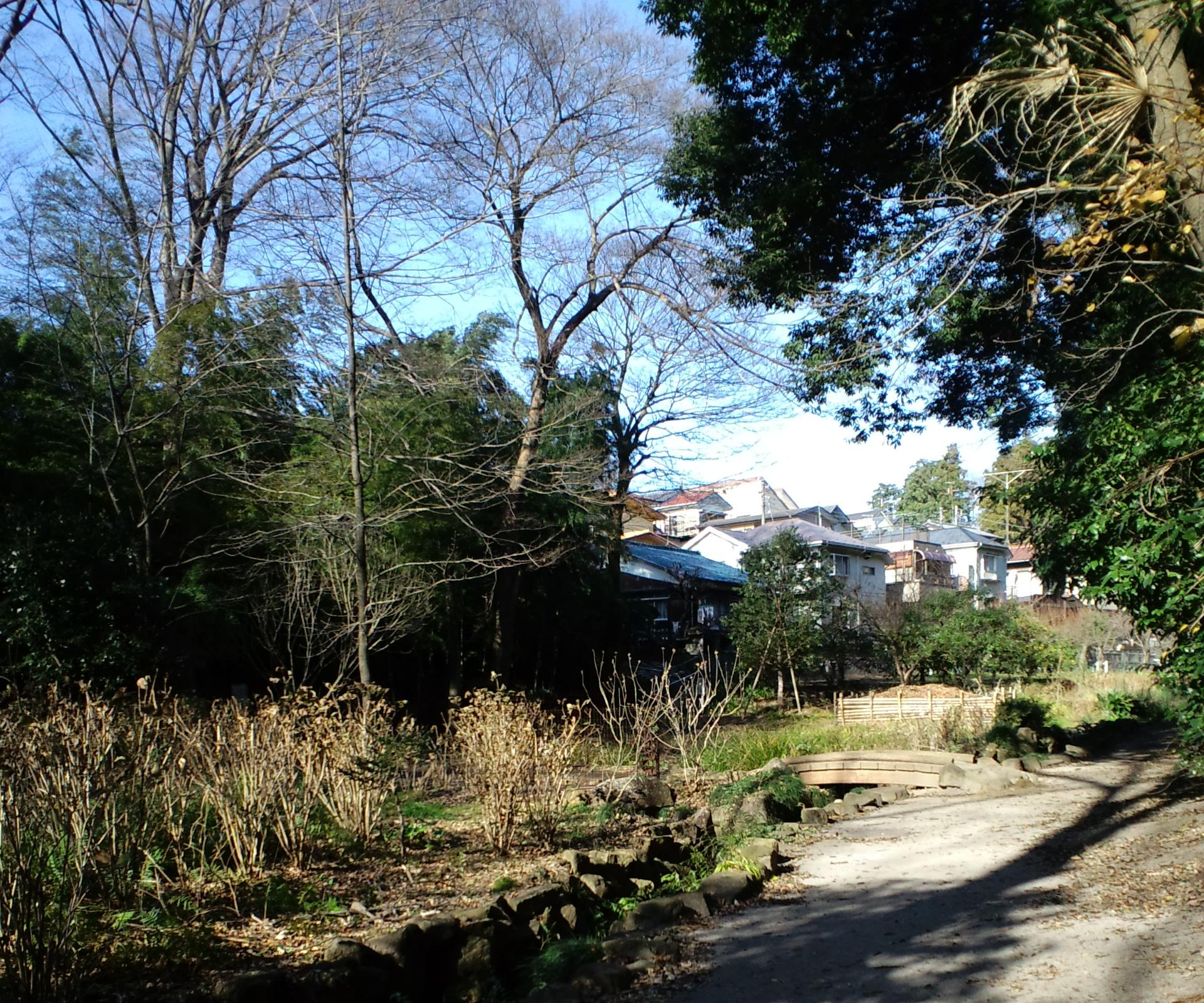 せせらぎの水辺付近(長屋門公園)